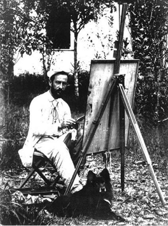 Henrique Bernadelli, Villa Strohl-Fern, innerhalb des Parks der Villa Borghese